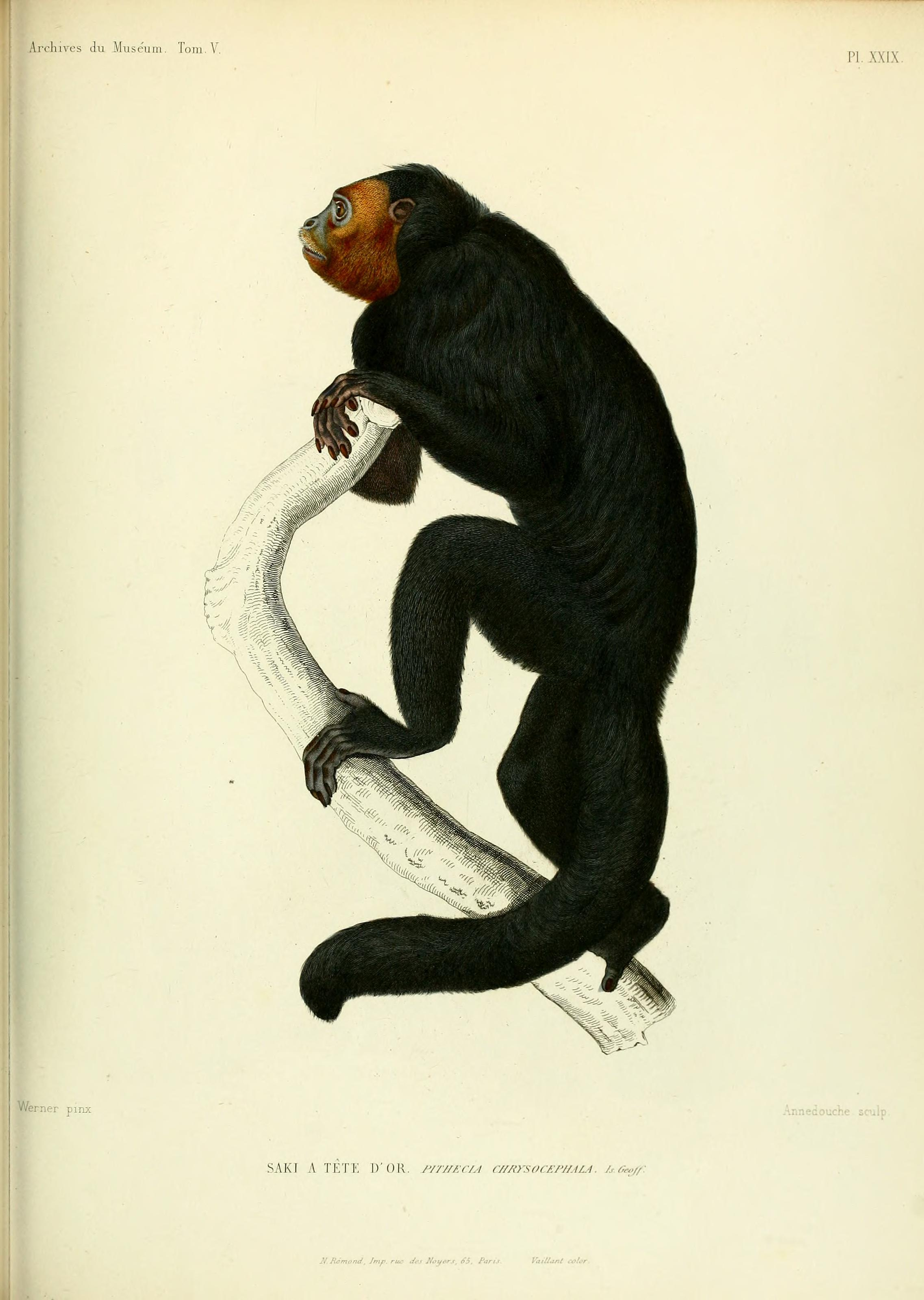 Archives du Muséum d'Histoire Naturelle, Paris.